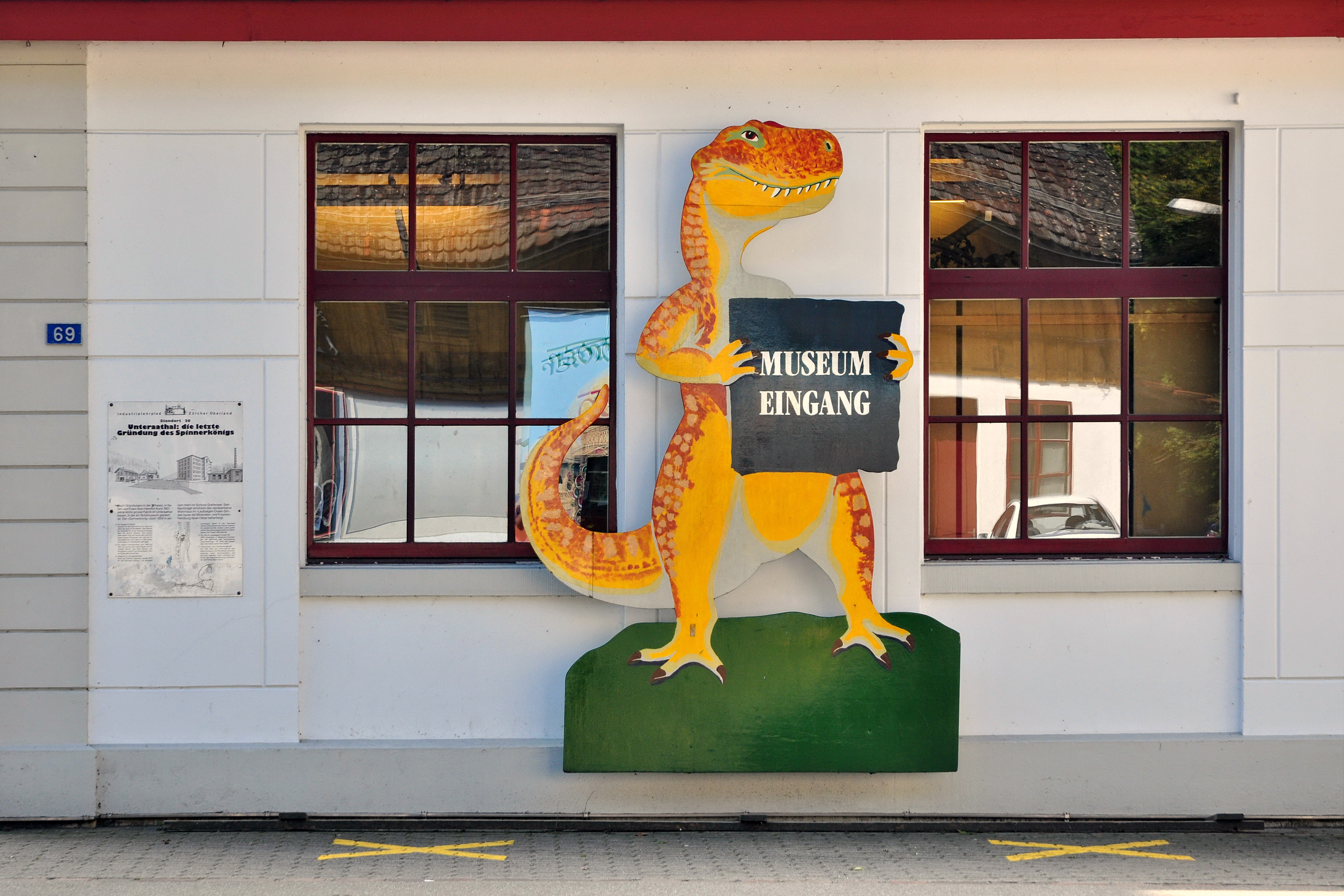 Sauriermuseum Aathal, Zürichstrasse / Unter Aathal 202 in Aathal-Seegräben (Switzerland)